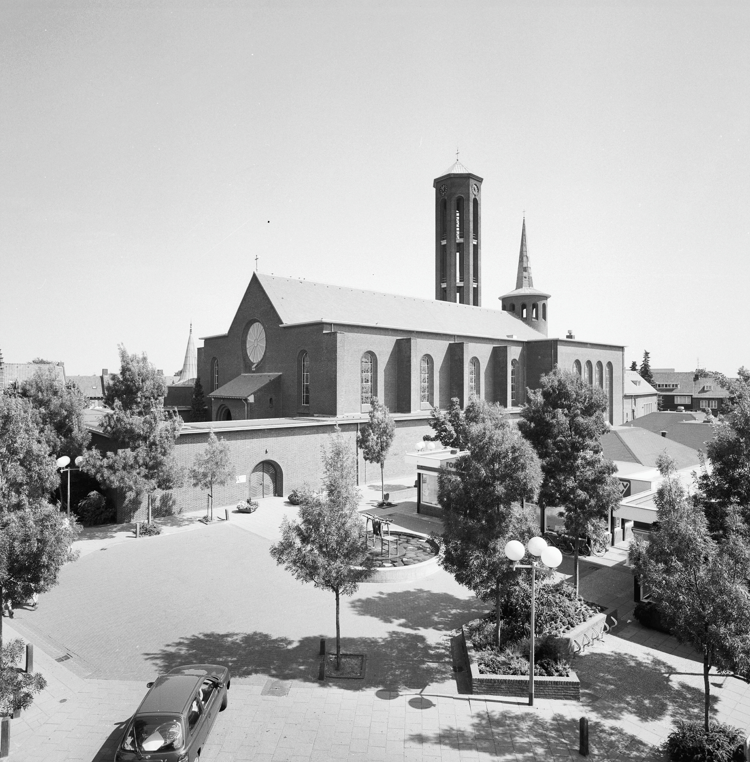 Rooms-Katholieke Kerk: Exterieur OVERZICHT NOORDGEVEL